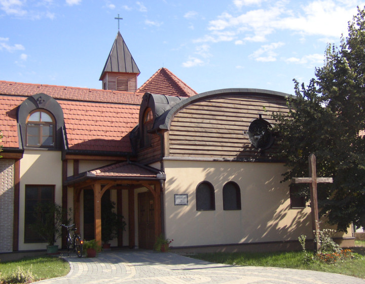 Marchegg, Lower Austria - Kloster „Gemeinschaft vom heiligen Johannes“, monastery